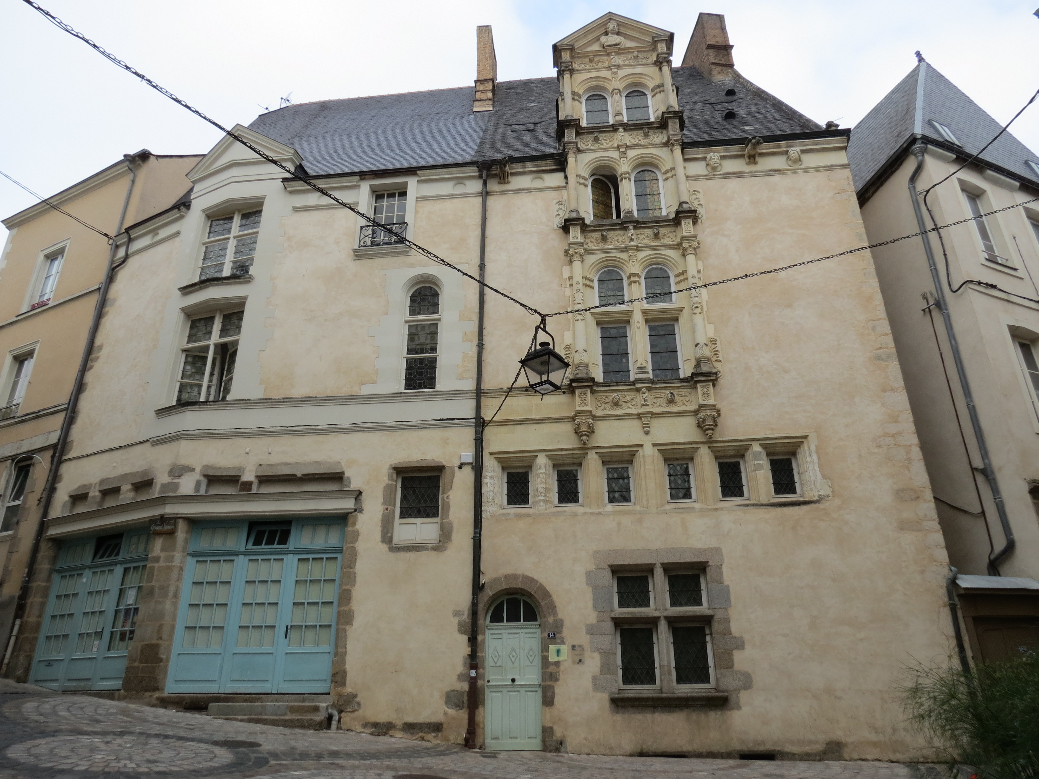 Maison du Grand-Veneur, Laval, Mayenne, Pays de la Loire.